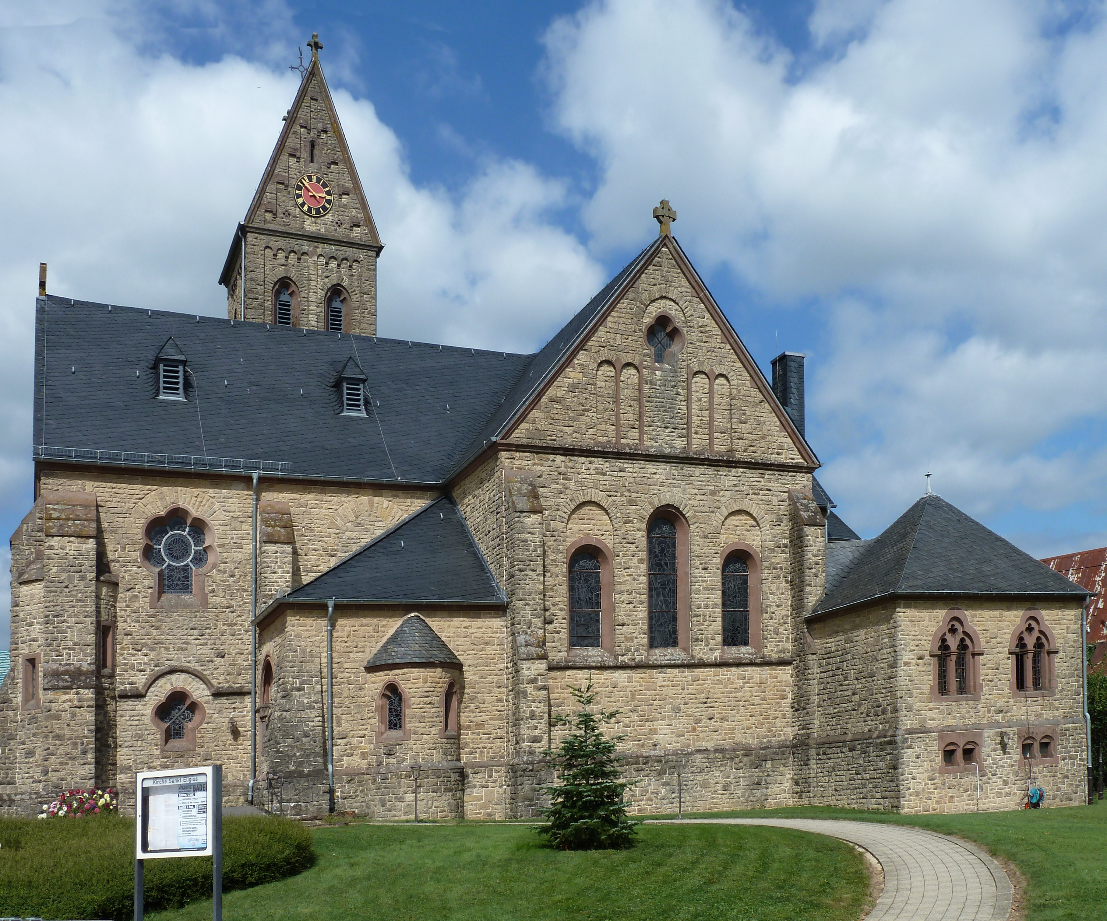 Sint Eligius kerk in Badem